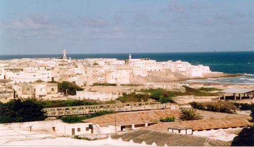 Marka, Somalia